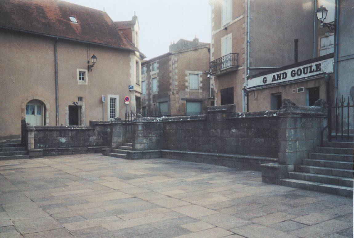 * Date : 8 août 2004 Source : photo personnelle d'archeos Description : Parvis de justice de l'église sainte-Radegonde de Poitiers. Licence